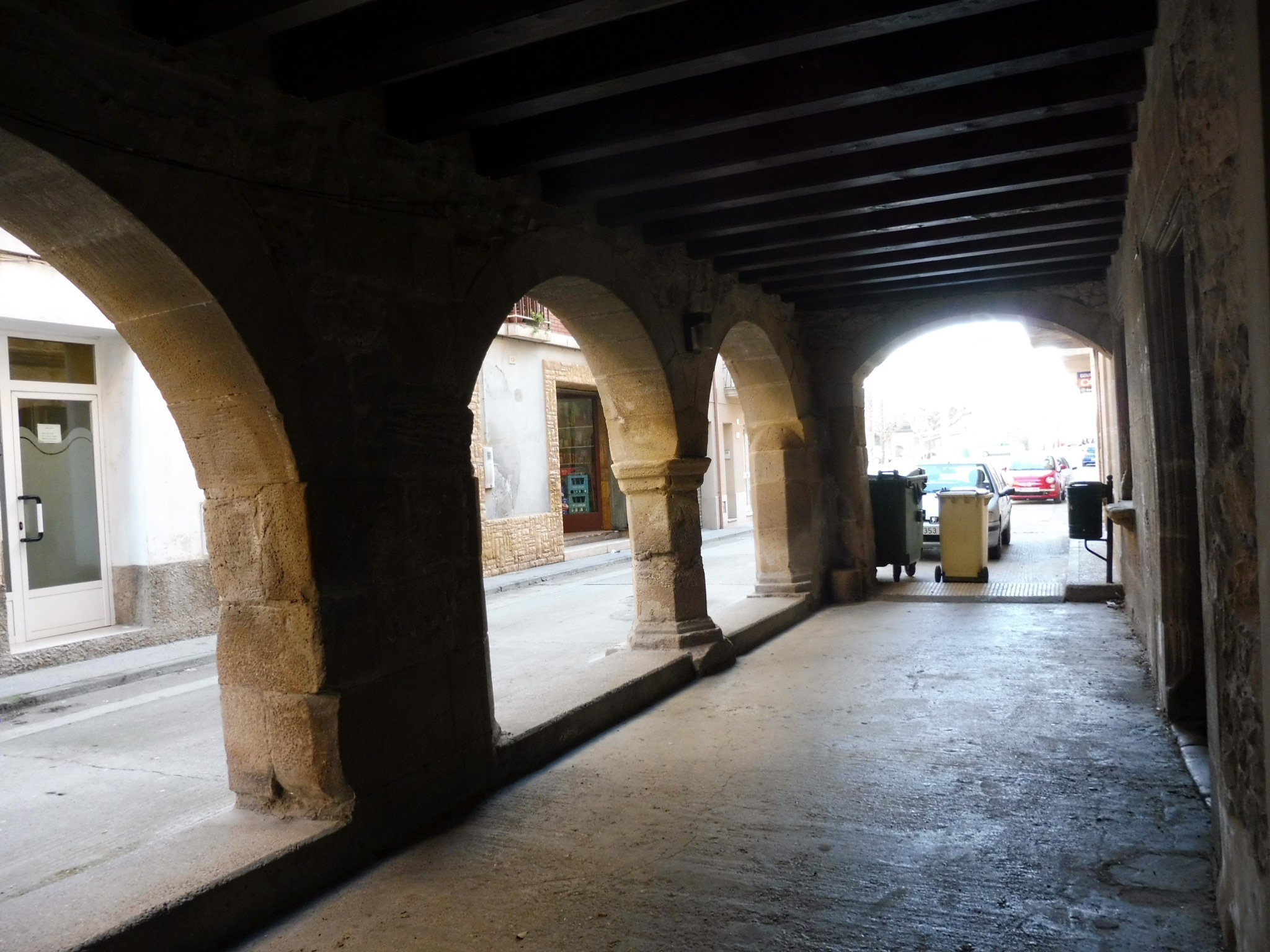 Casa del Marquès de Castellvell (Anglesola)